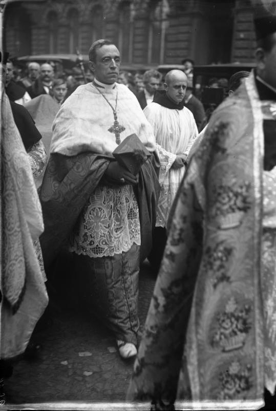 Berlin. Festgottesdienst anlässlich des Krönungstages des jetzigen Papstes unter Anwesenheit des apostolischen Nunzius Monsignore Pacelli, des hiesigen diplomatischen Korps und der Vertreter der Reichsregierung in der Hedwigskirche statt. Der apostolische Nunzius Pacelli in dem Festzuge nach der Feier in der Hedwigskirche.